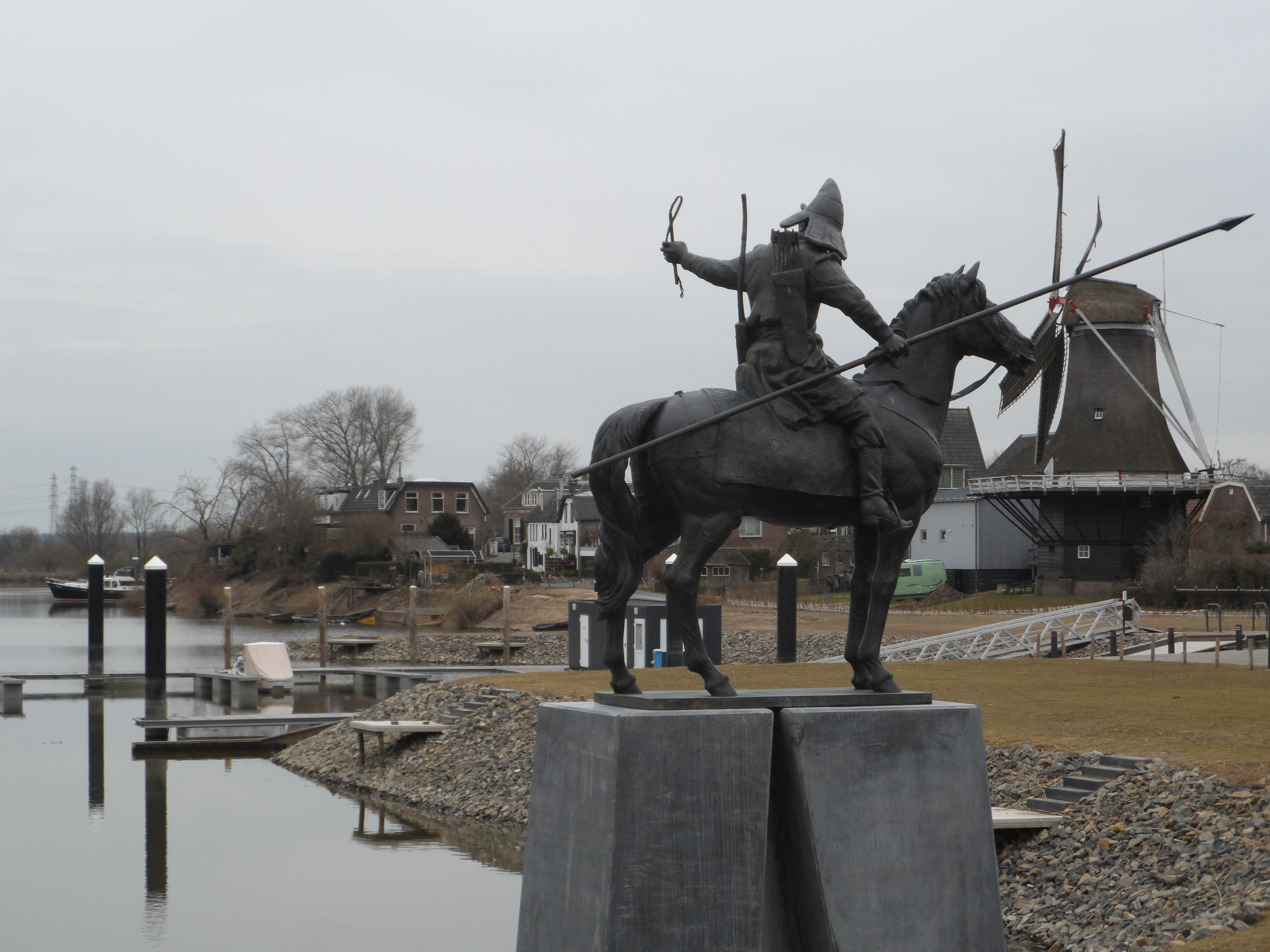 In Veessen bij de haven en molen staat sinds januari 2018 een standbeeld van een Basjkier. Hij en zijn makkers bevrijdden in 1813 ons land uit de Franse bezetting